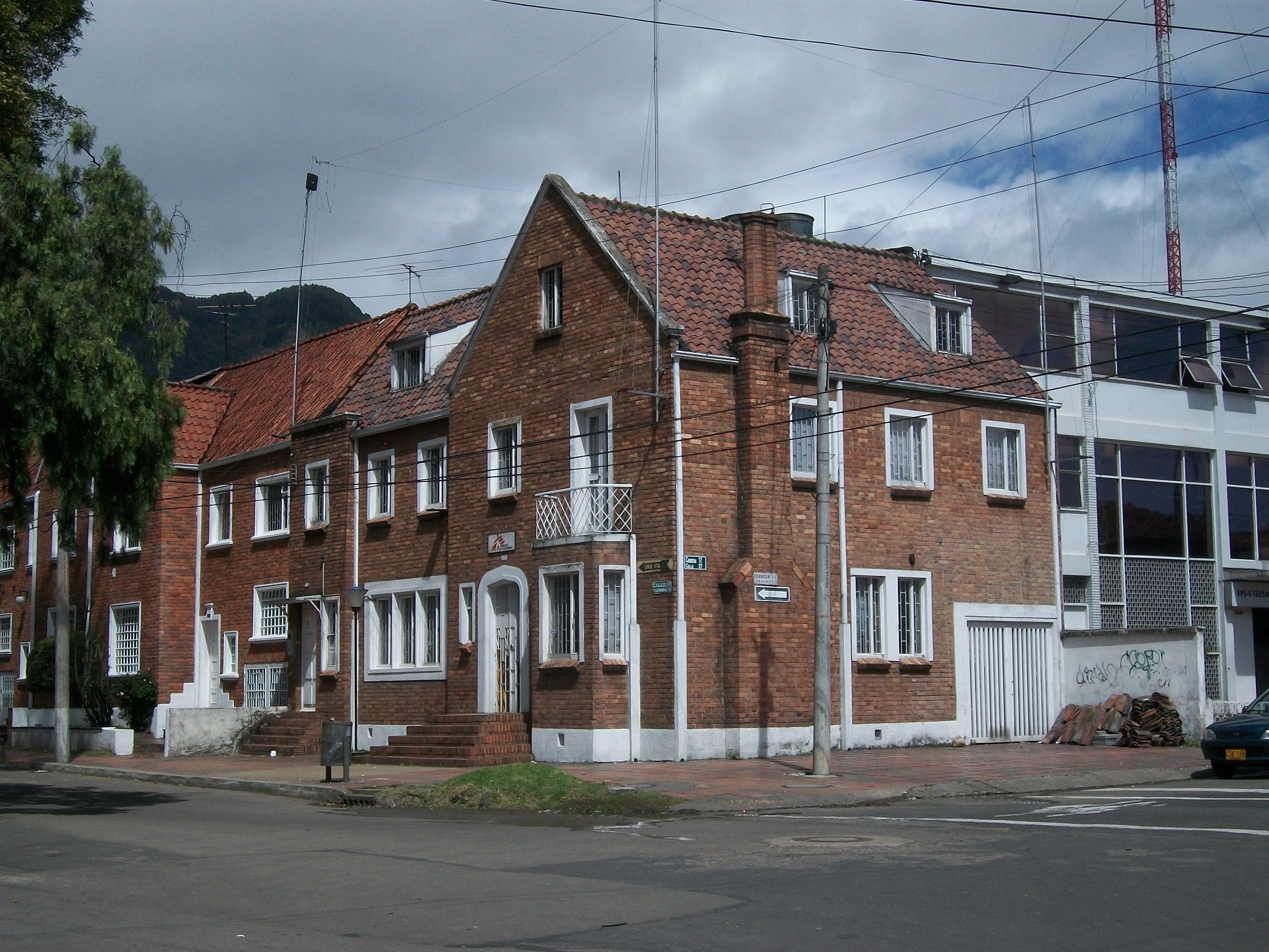 Cra 17 clle 37, Bogotá, Teusaquillo.